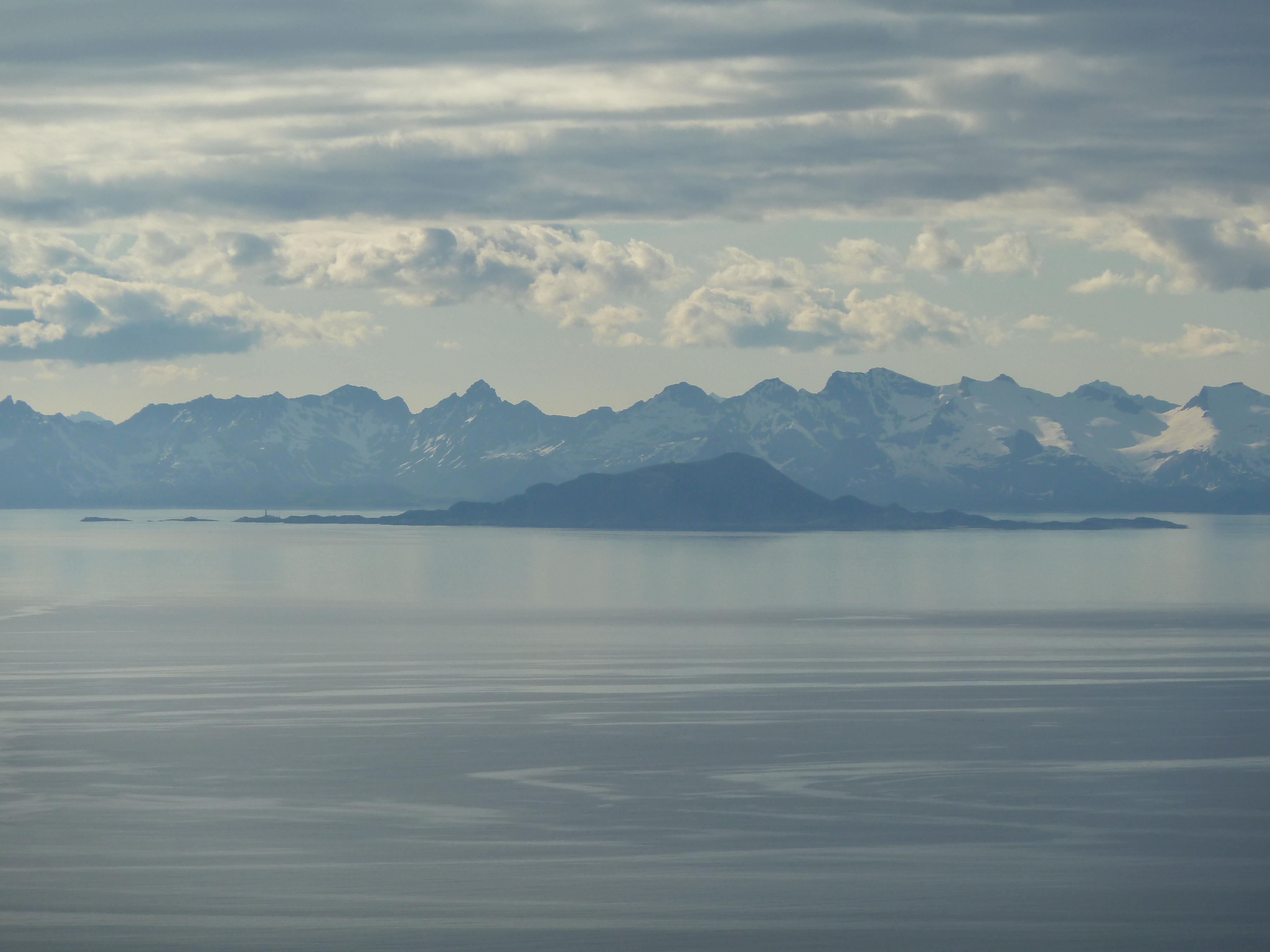 Skrova i Vestfjorden sett fra Salen i Hamarøy.